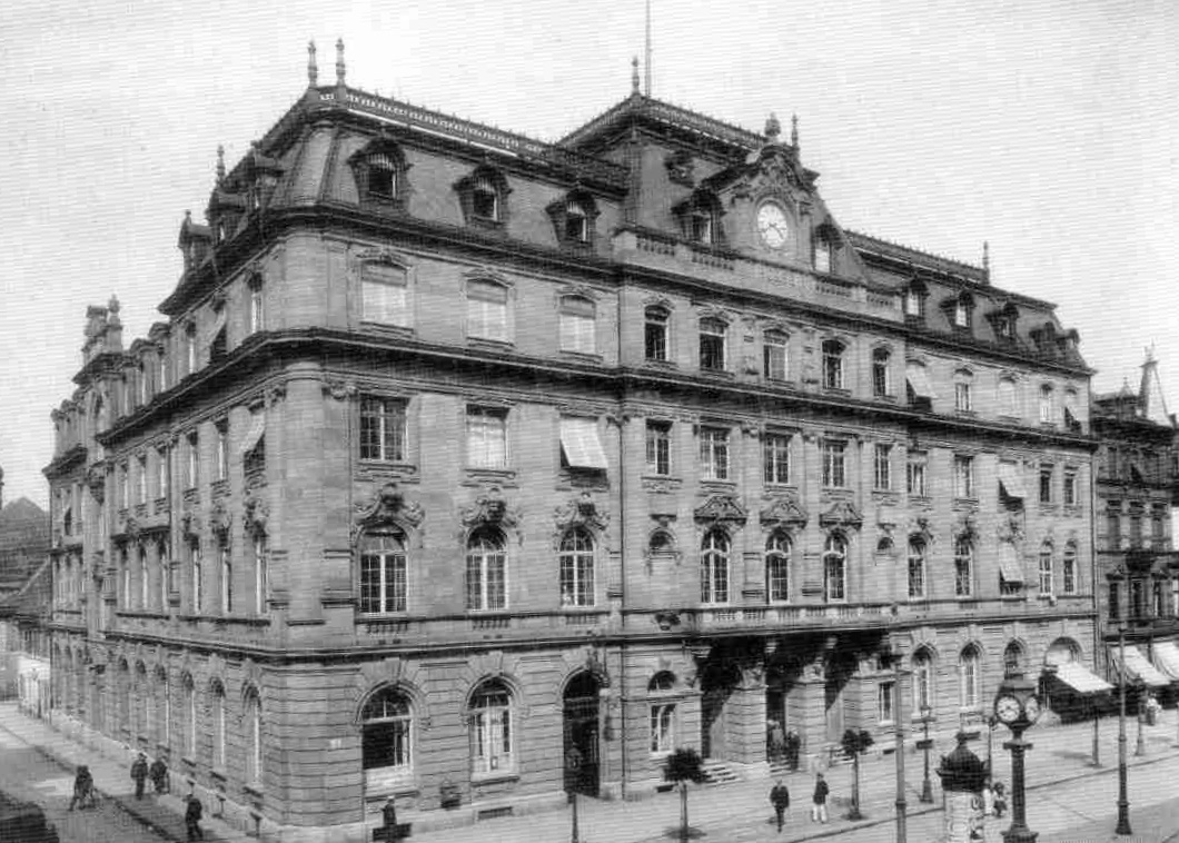 Mannheim, E 4, 12-16, Börse um 1902, auf dem Grundstück des 1899 abgerissenen Hotel Portugal